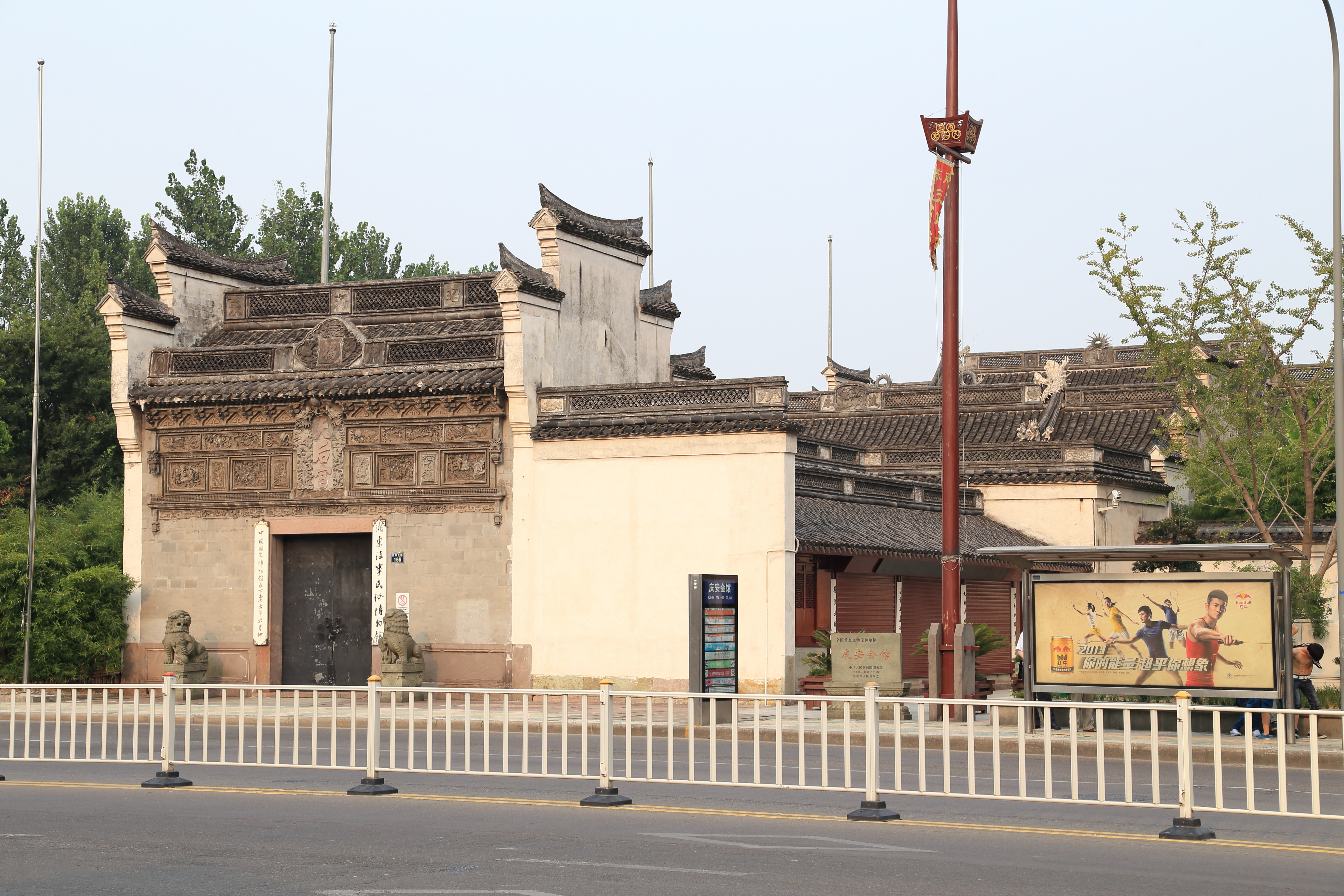 宁波庆安会馆